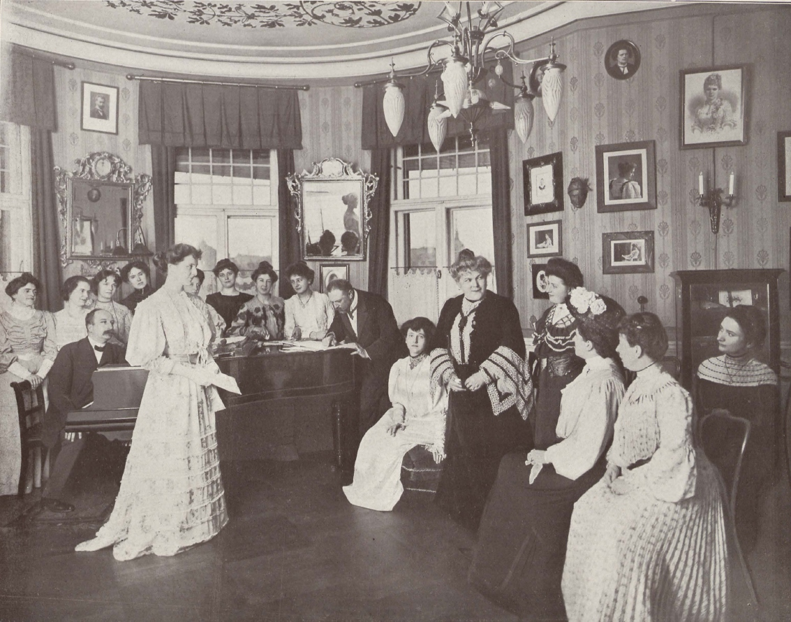 Elka Gerster, auch: Etelka Gerster-Gardini, 1855-1920, ungarische Sopranistin.